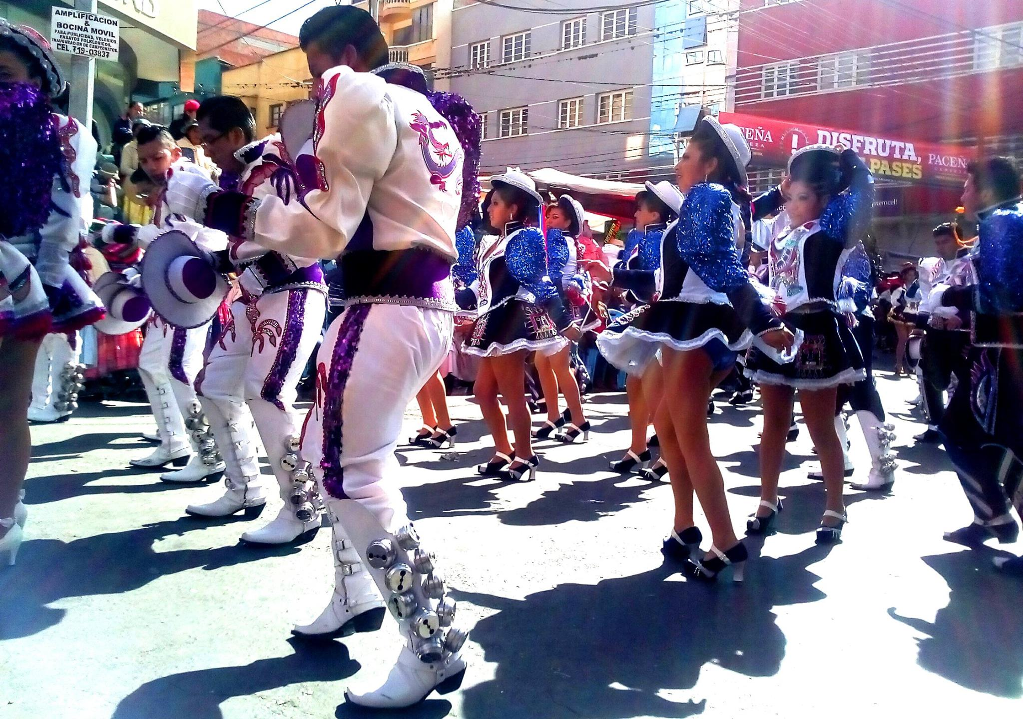 La Paz Bolivia 2017